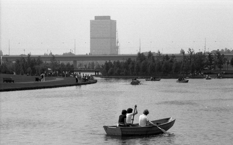 Bundesgartenschau in Bonn